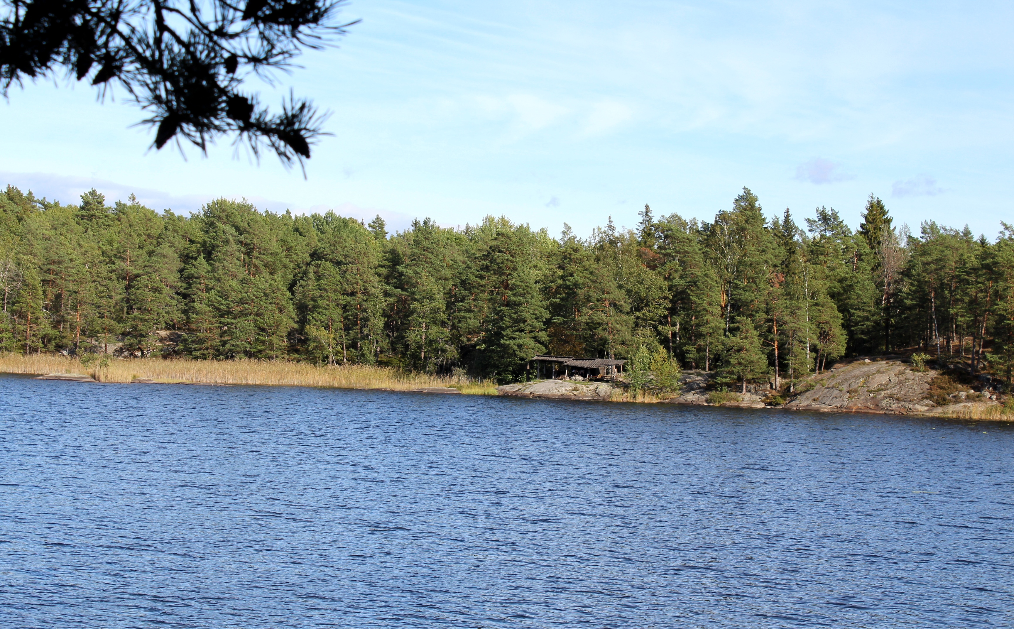 Trehörningen, Nacka kommun